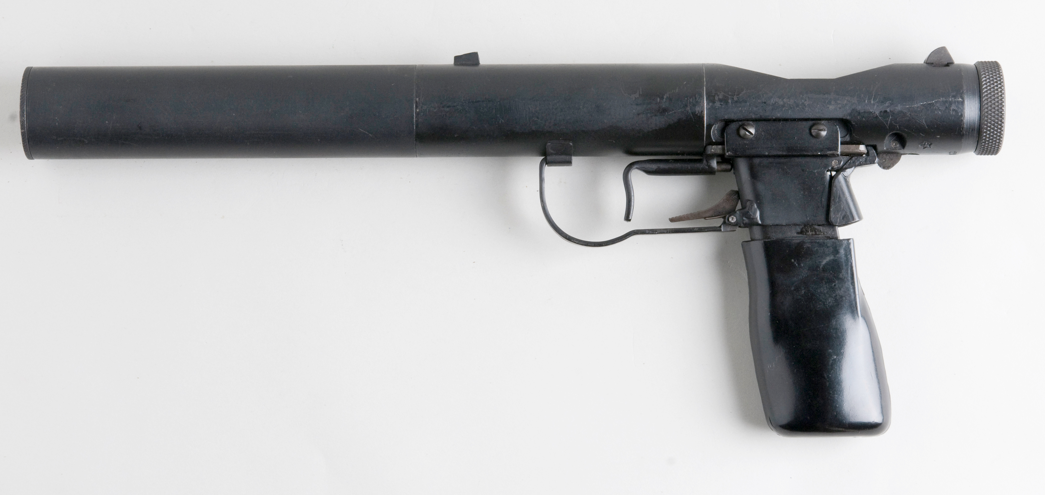 Welrod Mk I From flickr user handvapensamlingen - Pistols used in Norway.